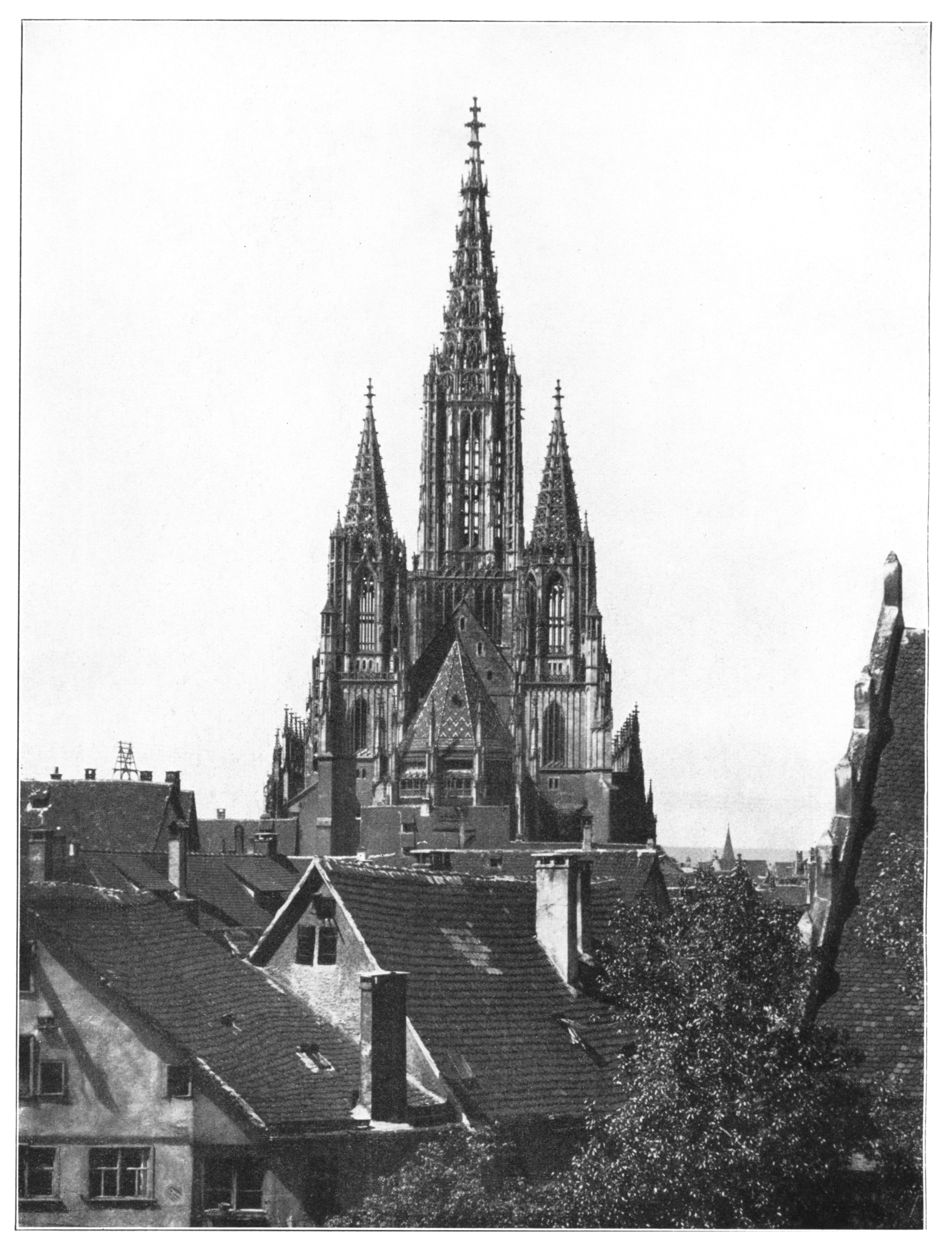 Das Ulmer Münster von der Chorseite.